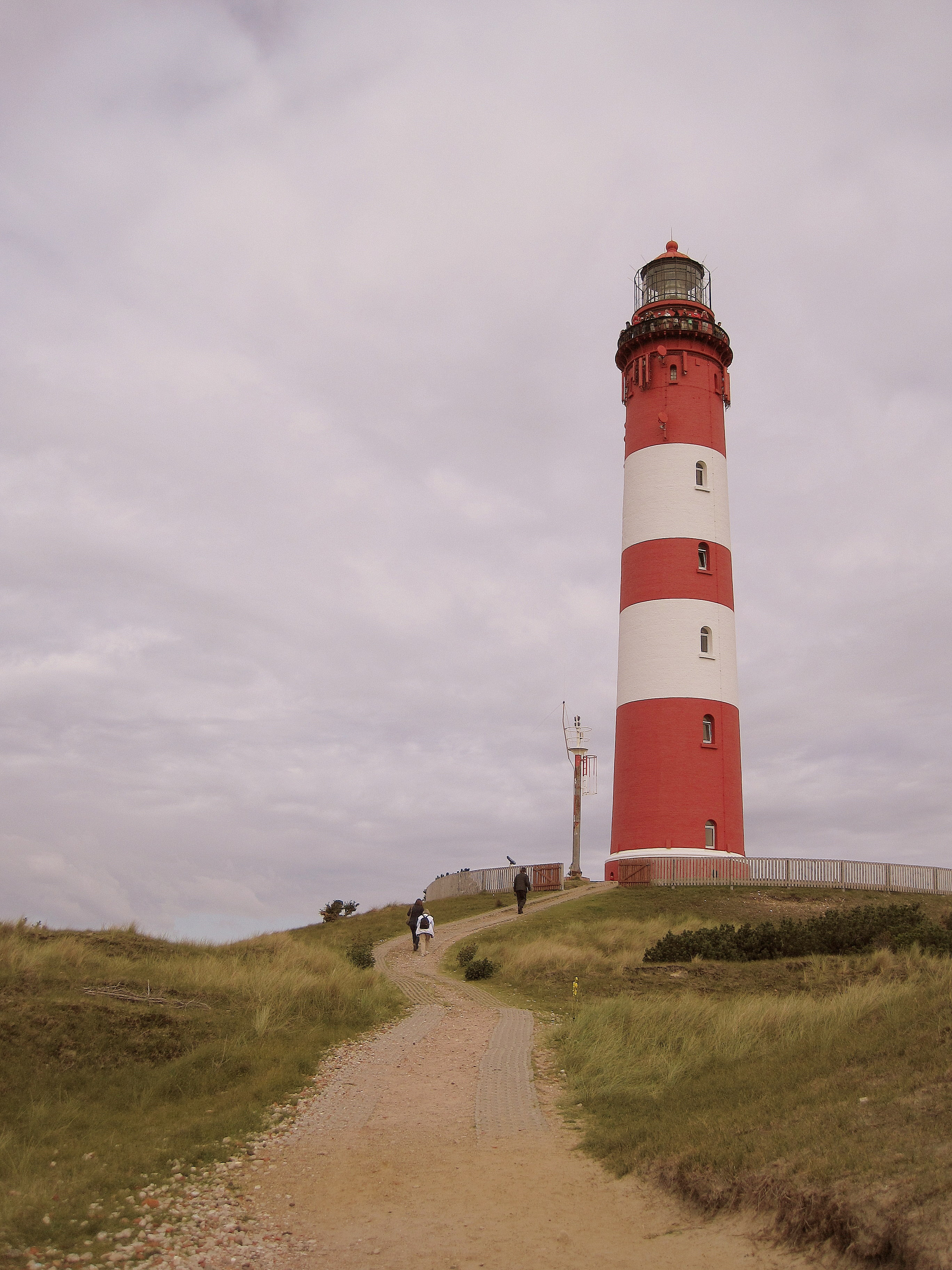 Leuchtturm auf Amrum